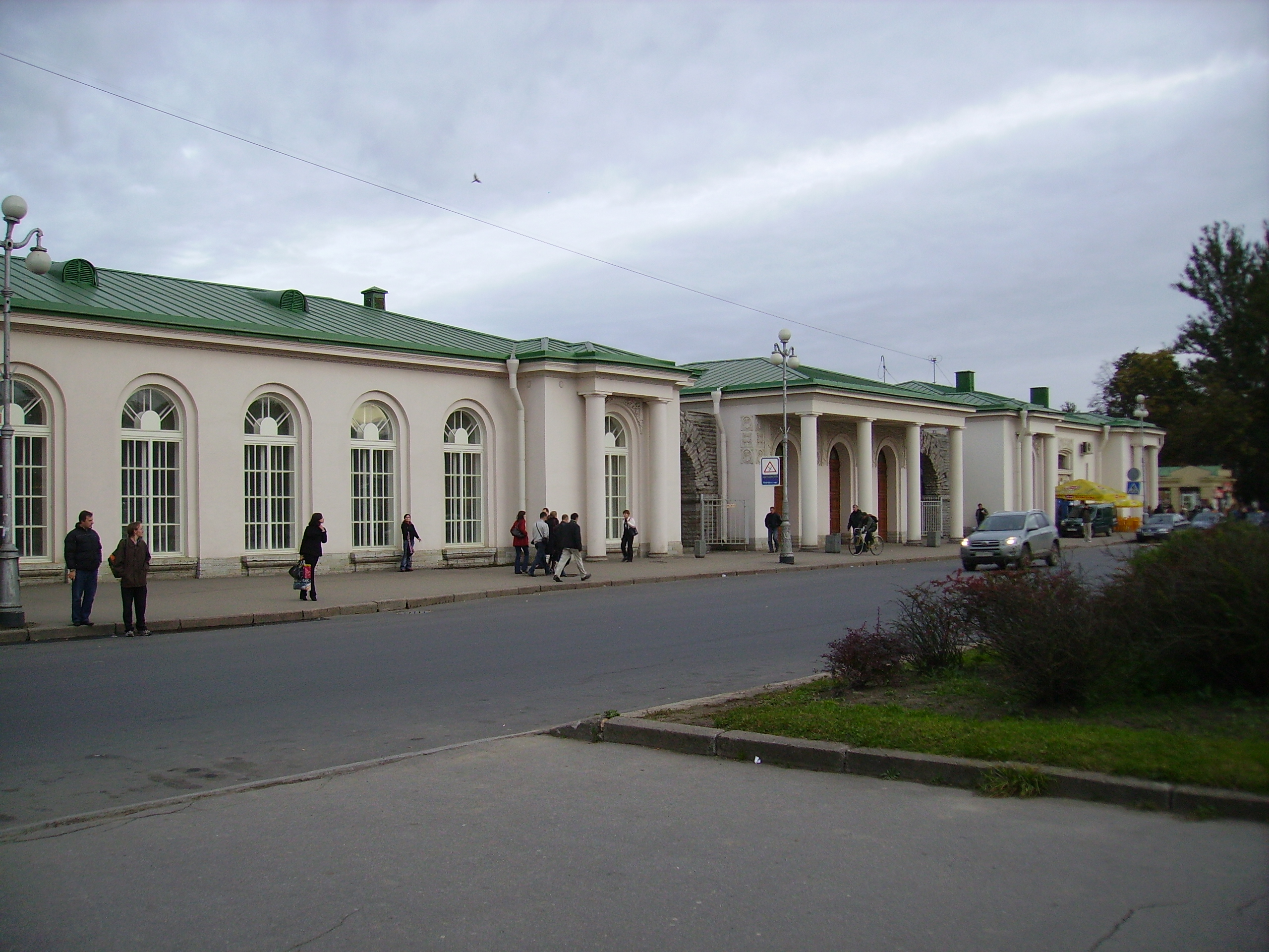 Железнодорожная станция «Детское село» (Санкт-Петербург). Вид на южную часть вокзала с привокзальной площади